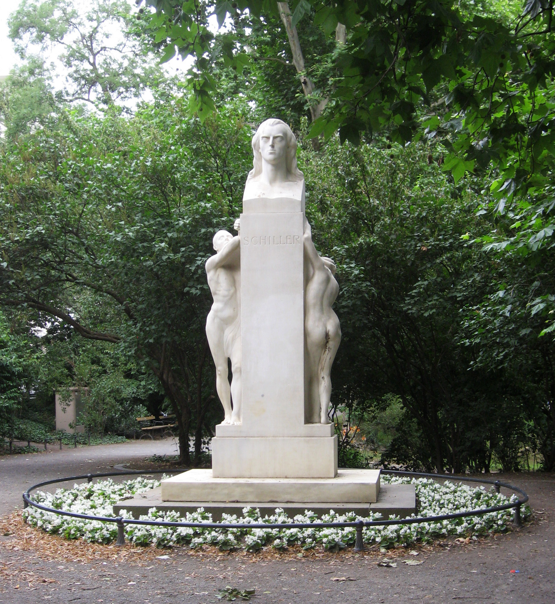 Schillerdenkmal im Leipziger SchillerparkEntwurf: Johannes HartmannAusführung: August SchmiemannEinweihung: 9. Mai 1914